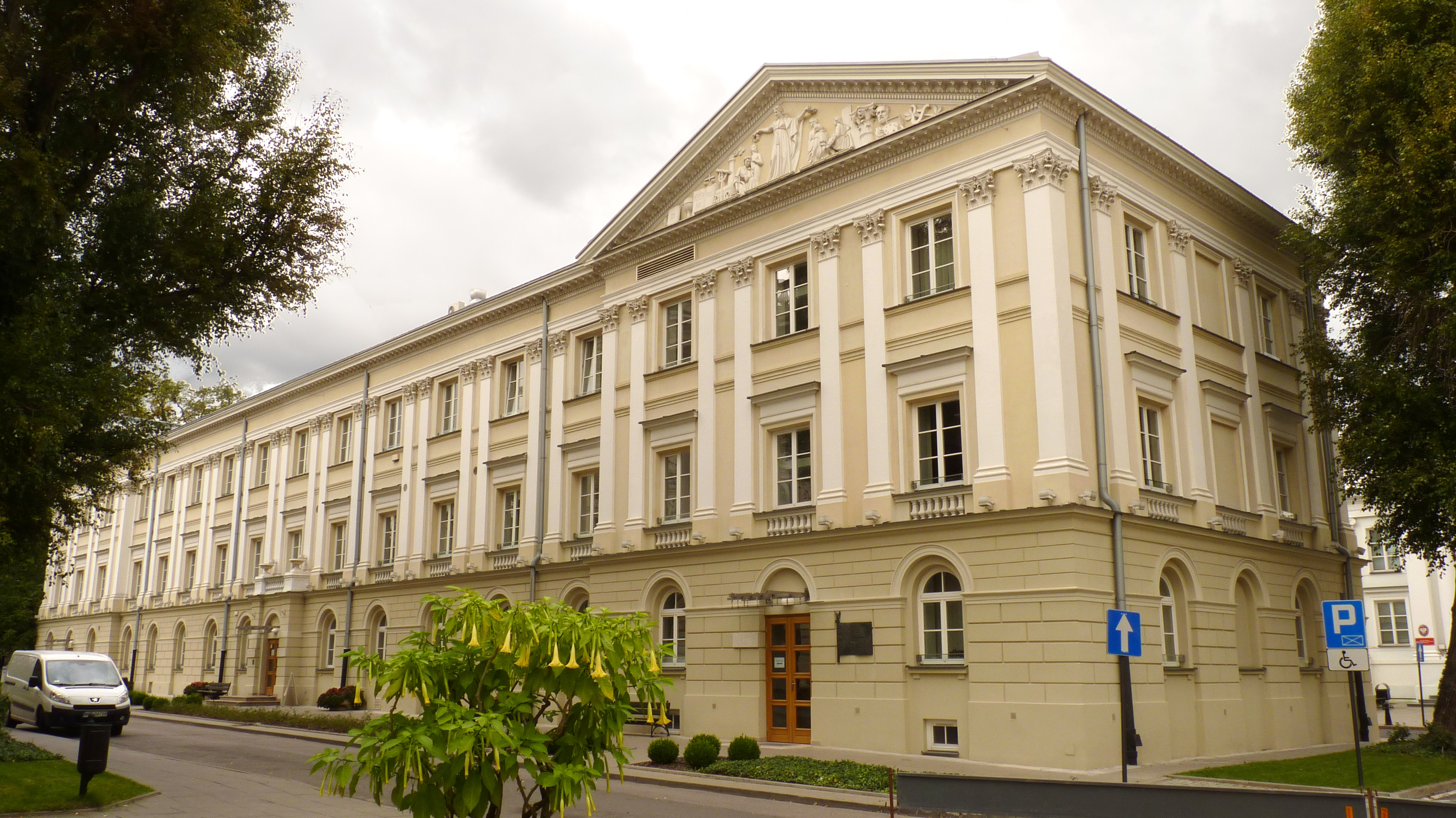 Warszawa, Gmach Poseminaryjny, ob. Wydział Prawa i Administracji, 1815-1816, 1861-62, 1949